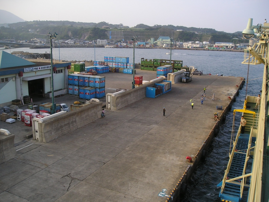 鹿児島県大島郡ja:徳之島町にある亀徳港の様子。（船上より撮影） Photo by Si-take. Sep.2005 Category:港湾画像ja:Category:鹿児島県の画像